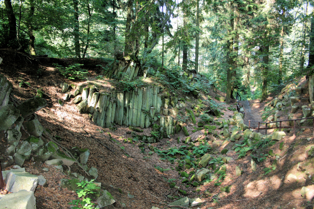 Basaltsteinbruch Windeck-Kuchhausen